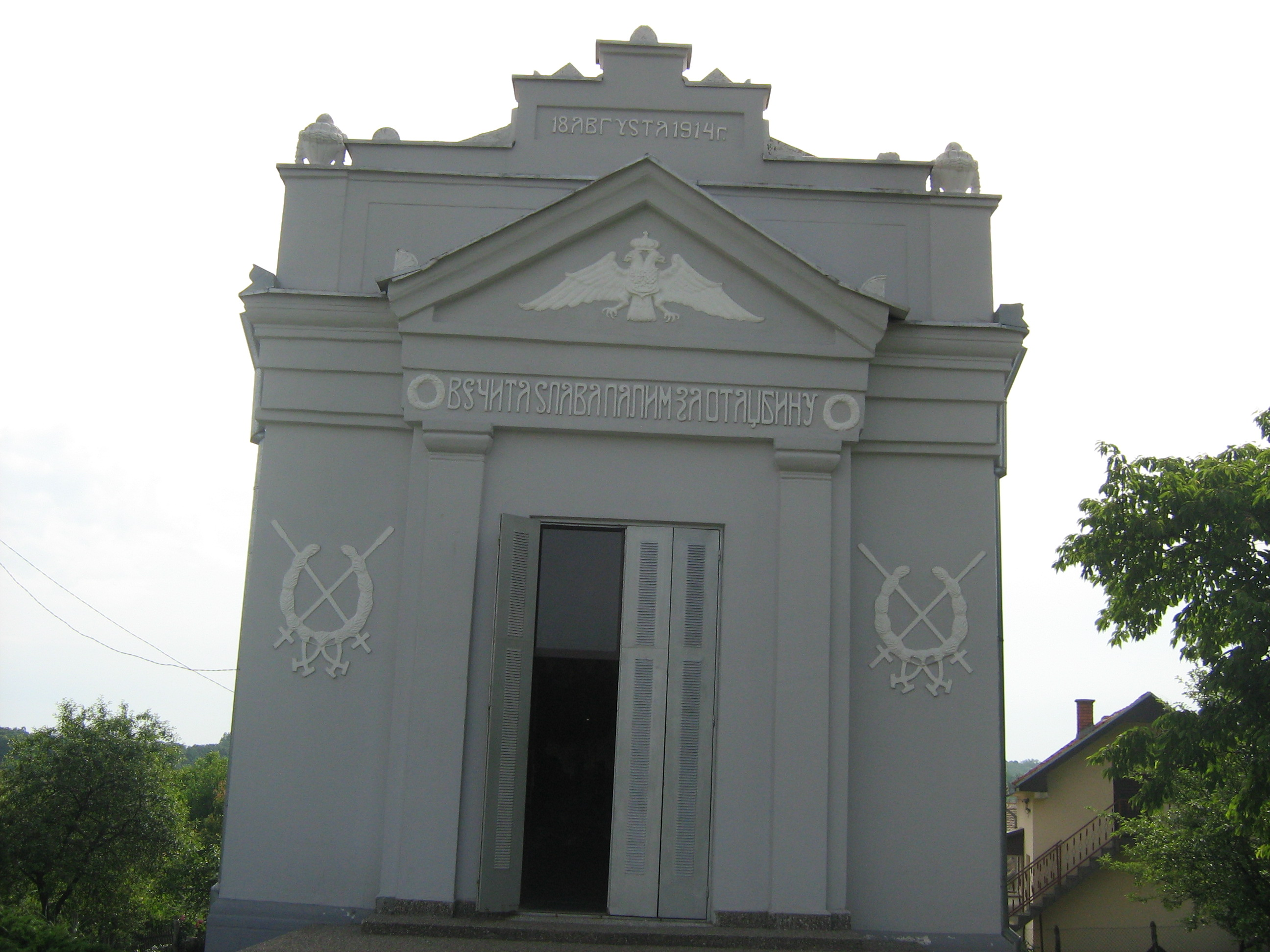 музеј Церске битке - споља